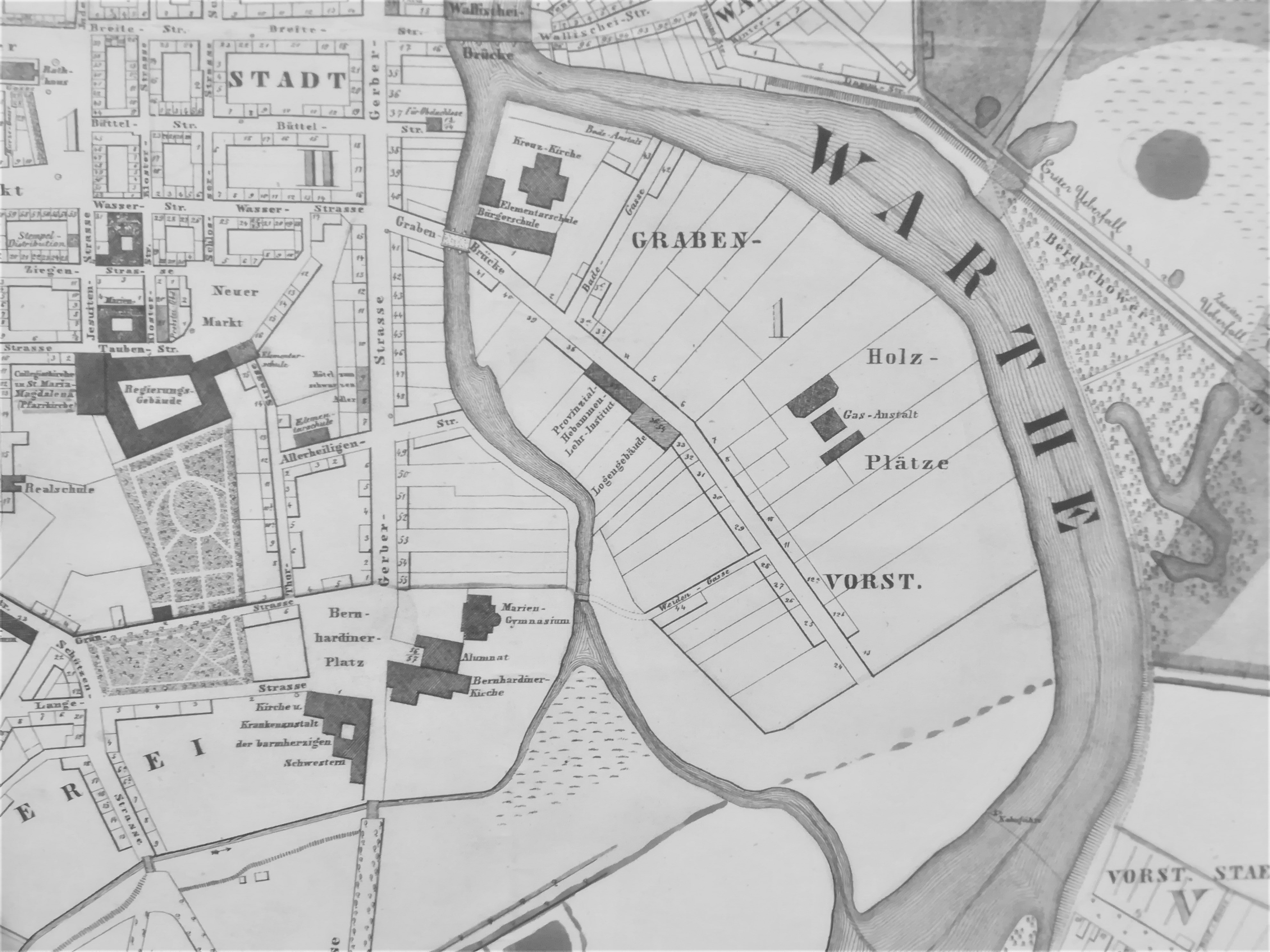 Mapa Corvinusa, Poznań - 1956 r. Grobla, Garbary, Stare Miasto.